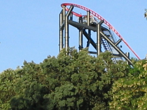 Atraccion in the Parque de Atracciones de Madrid